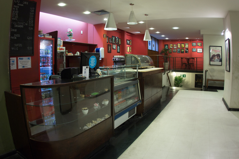 Café e bomboniére do Estação NET Ipanema